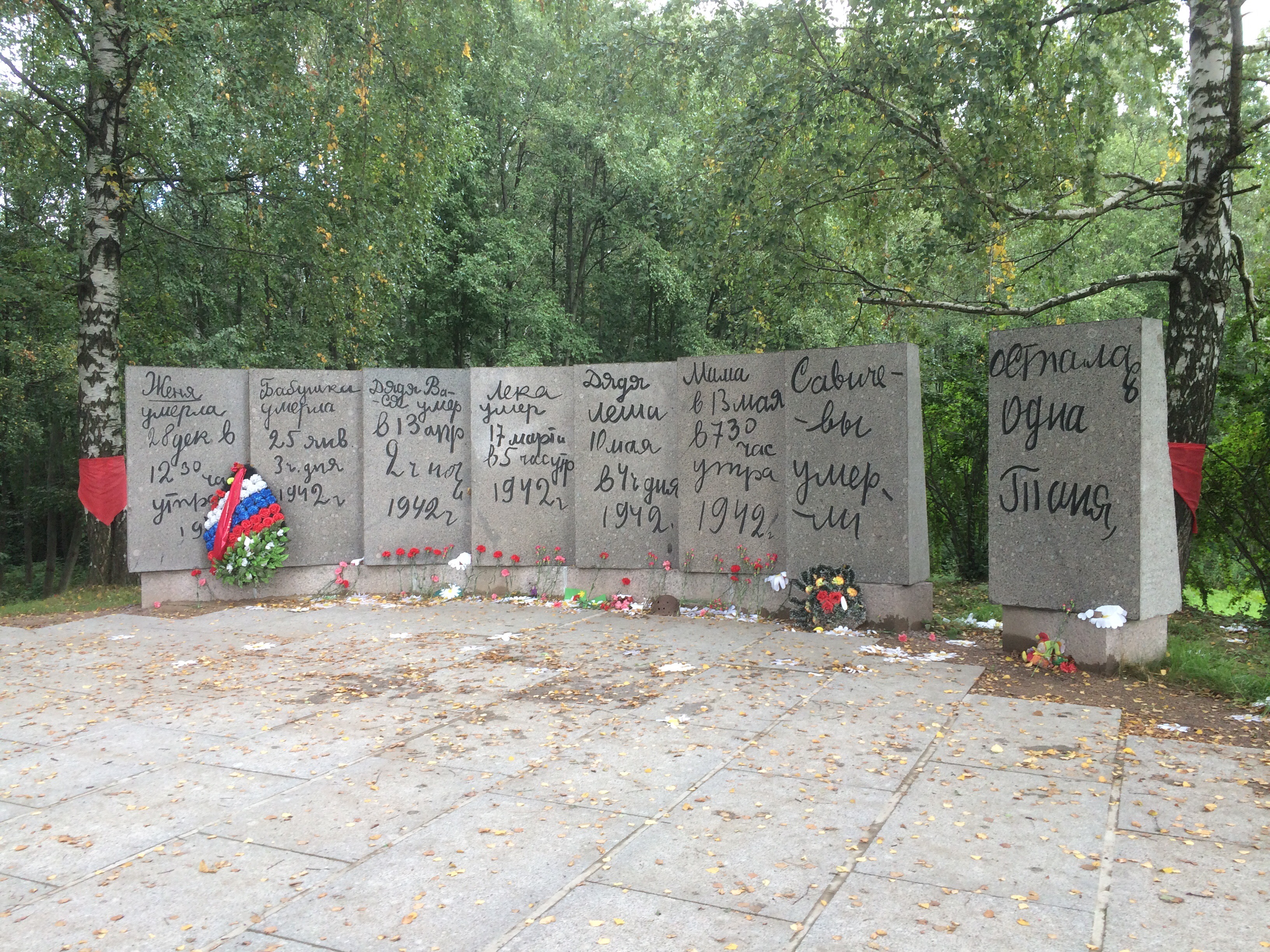 Мемориал «Дневник Тани Савичевой». Архитектор А. Д. Левенков.